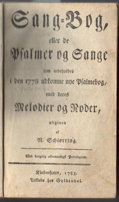 Tittelblad Guldbergs salmebok, utg. ved Schørring